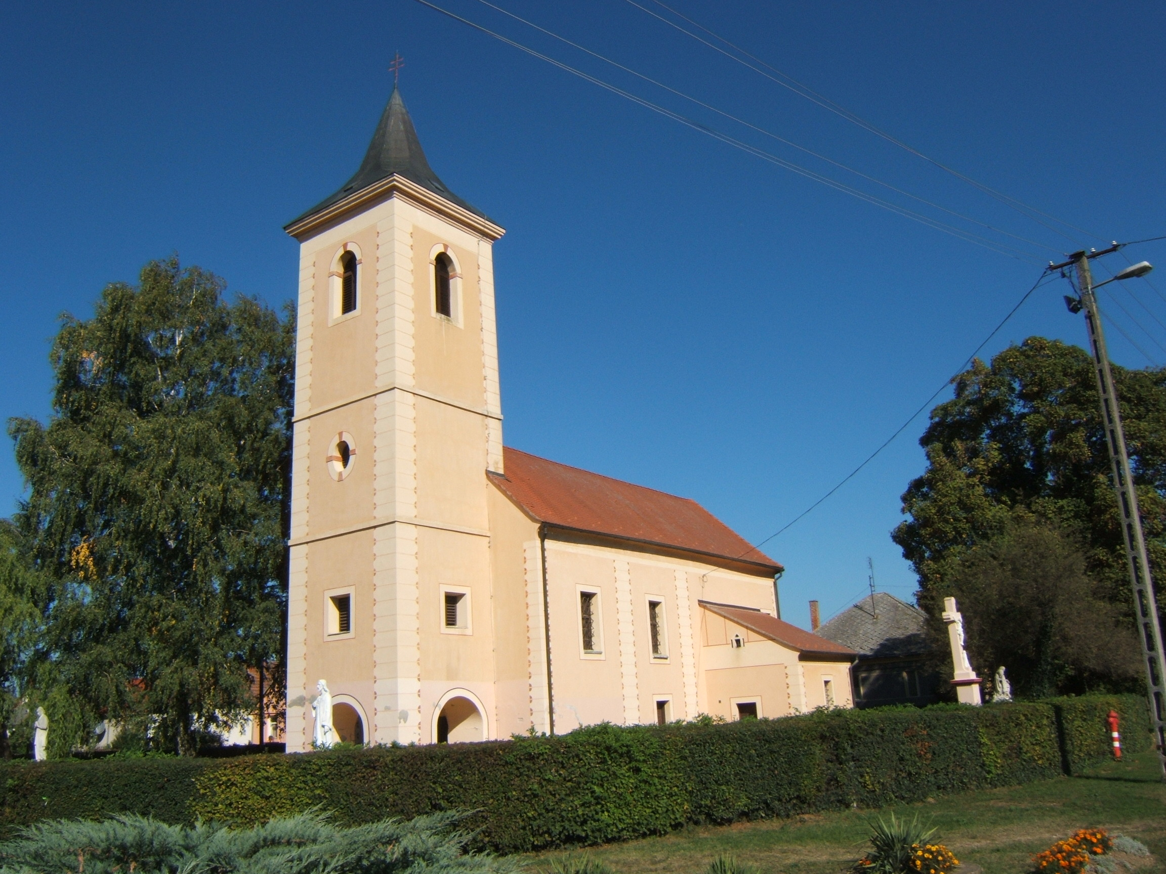 Muraszemenyei templom